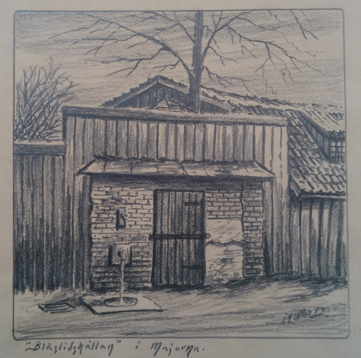 Kolteckning av Einar Hillberg föreställande Blåslidskällan i Majorna Göteborg